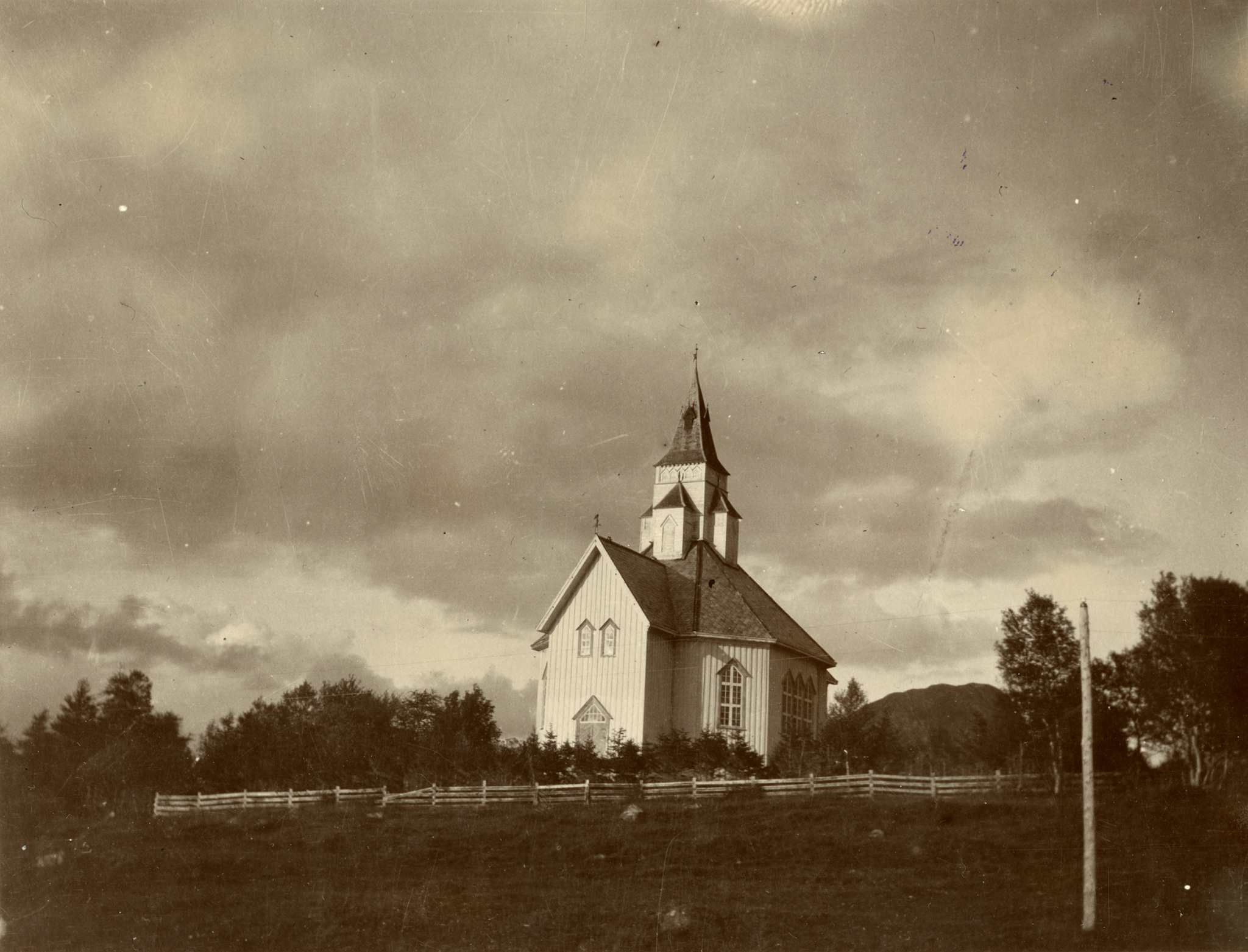 Otterøy kirke. Ukejnt fotograf/Riksantikvaren. Fra Kulturminnebilder.no.